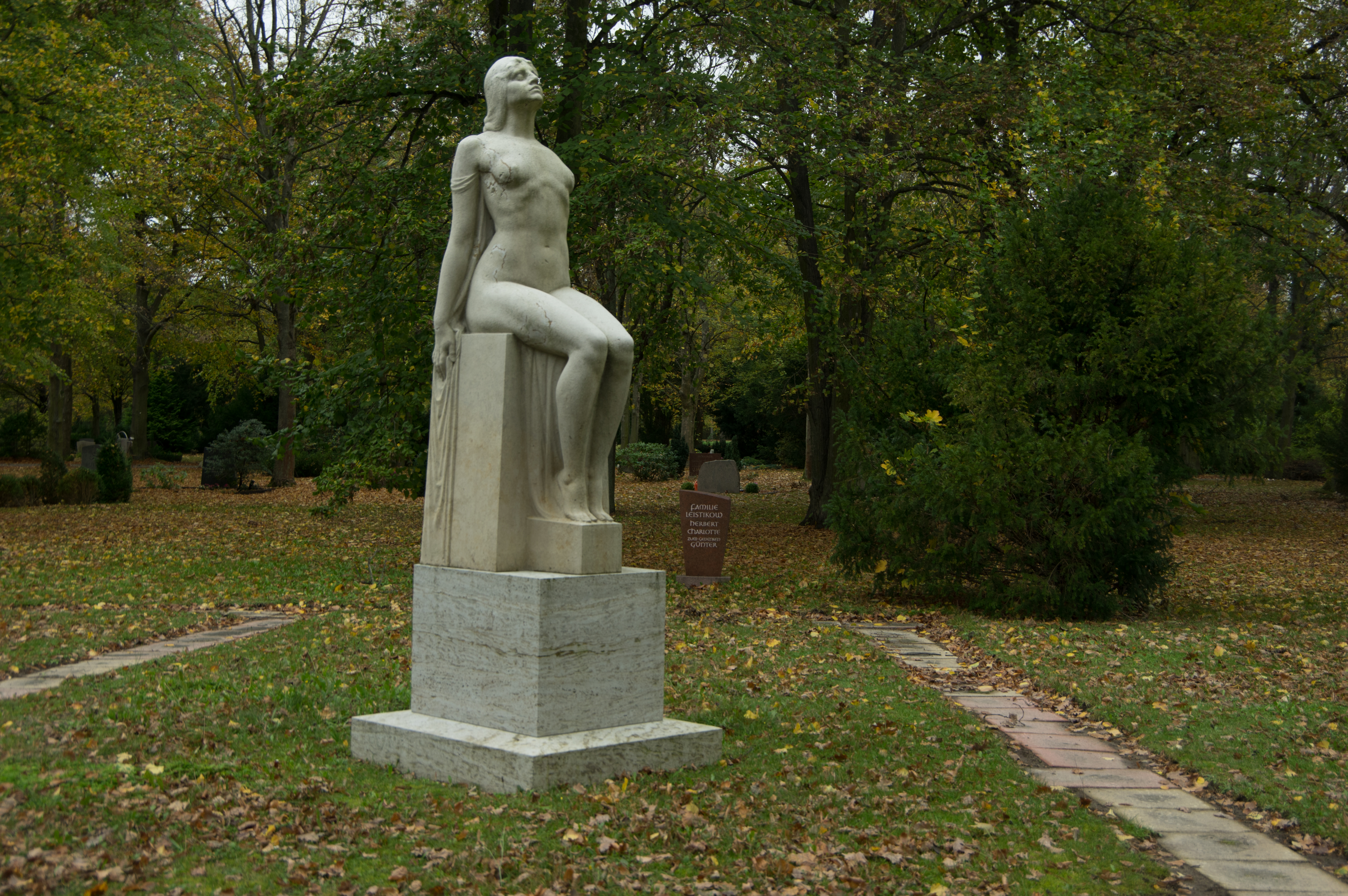 Neukölln in Berlin. Der Parkfriedhof befindet sich direkt nördlich de Britzer Garten an der Buckower Allee.